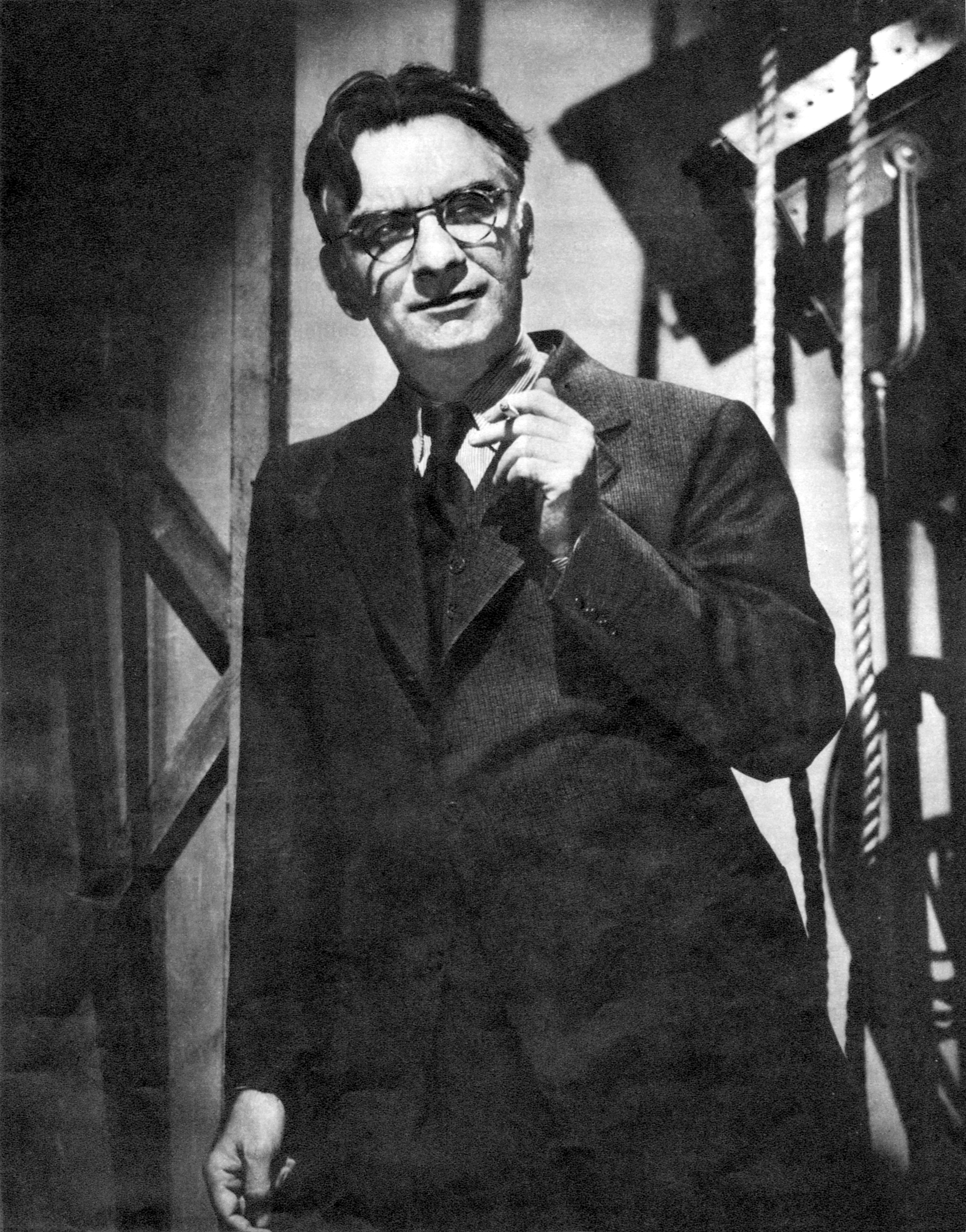 J. M. Cain